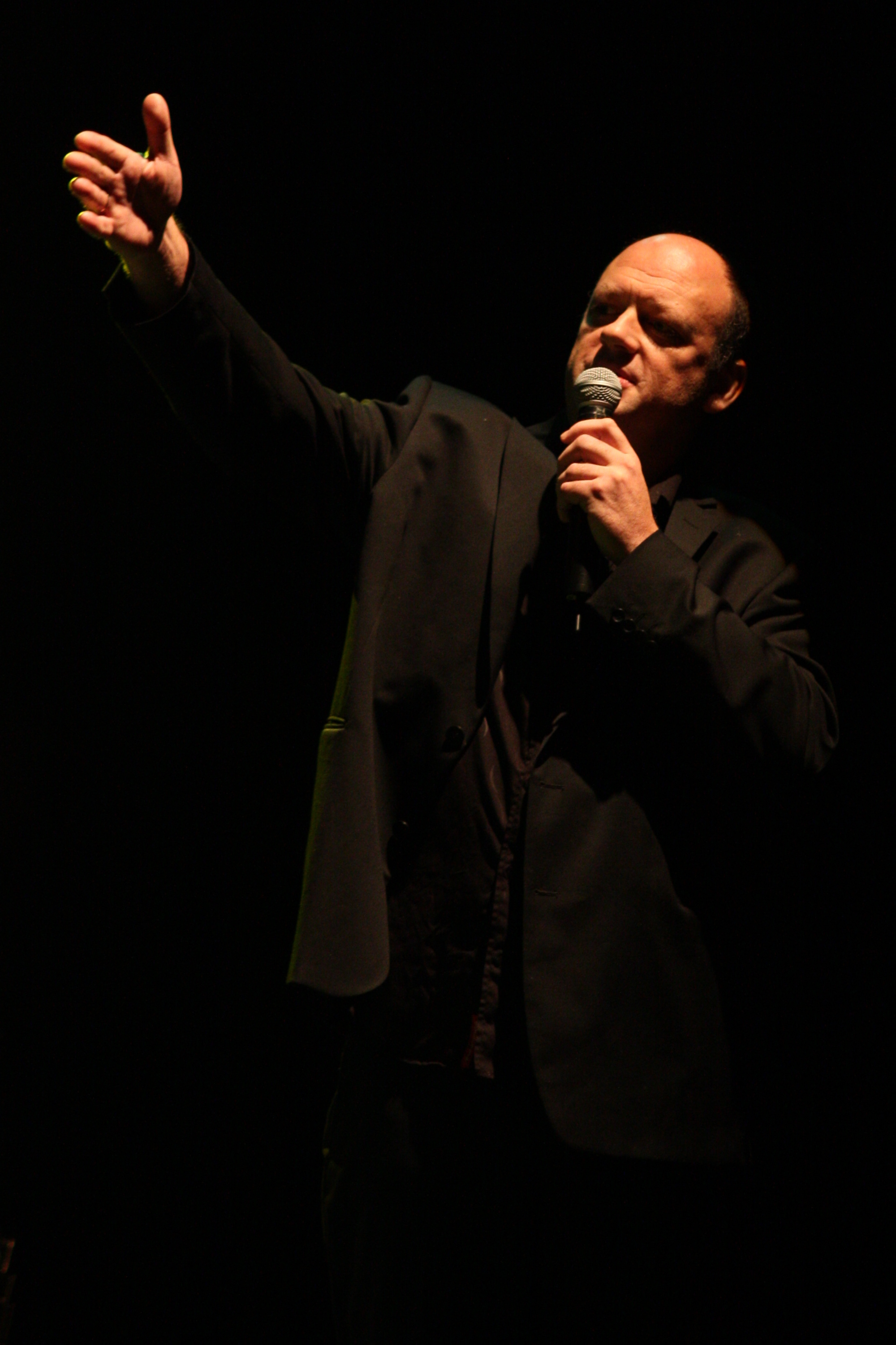 44. Deutsches Jazzfestival Frankfurt 2013: Helge Sunde als Gast-Bigband-Leiter der hr-Bigband